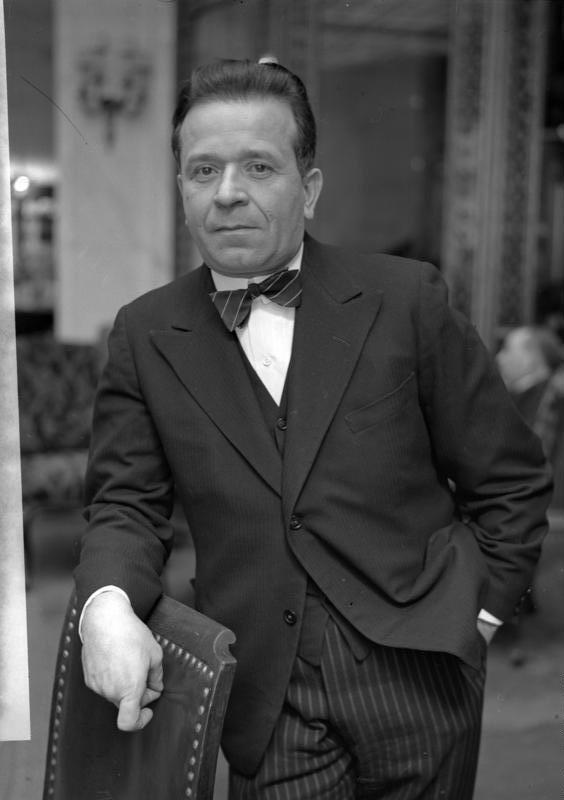 Der neue Leiter des Deutschen Theaters in Berlin ! Direktor Dr. Beer wurde von Prof. Max Reinhardt aus Wien berufen, um die Leitung des Deutschen Theaters, sowie die Umorganisation der Reinhardtbühnen vorzunehmen.